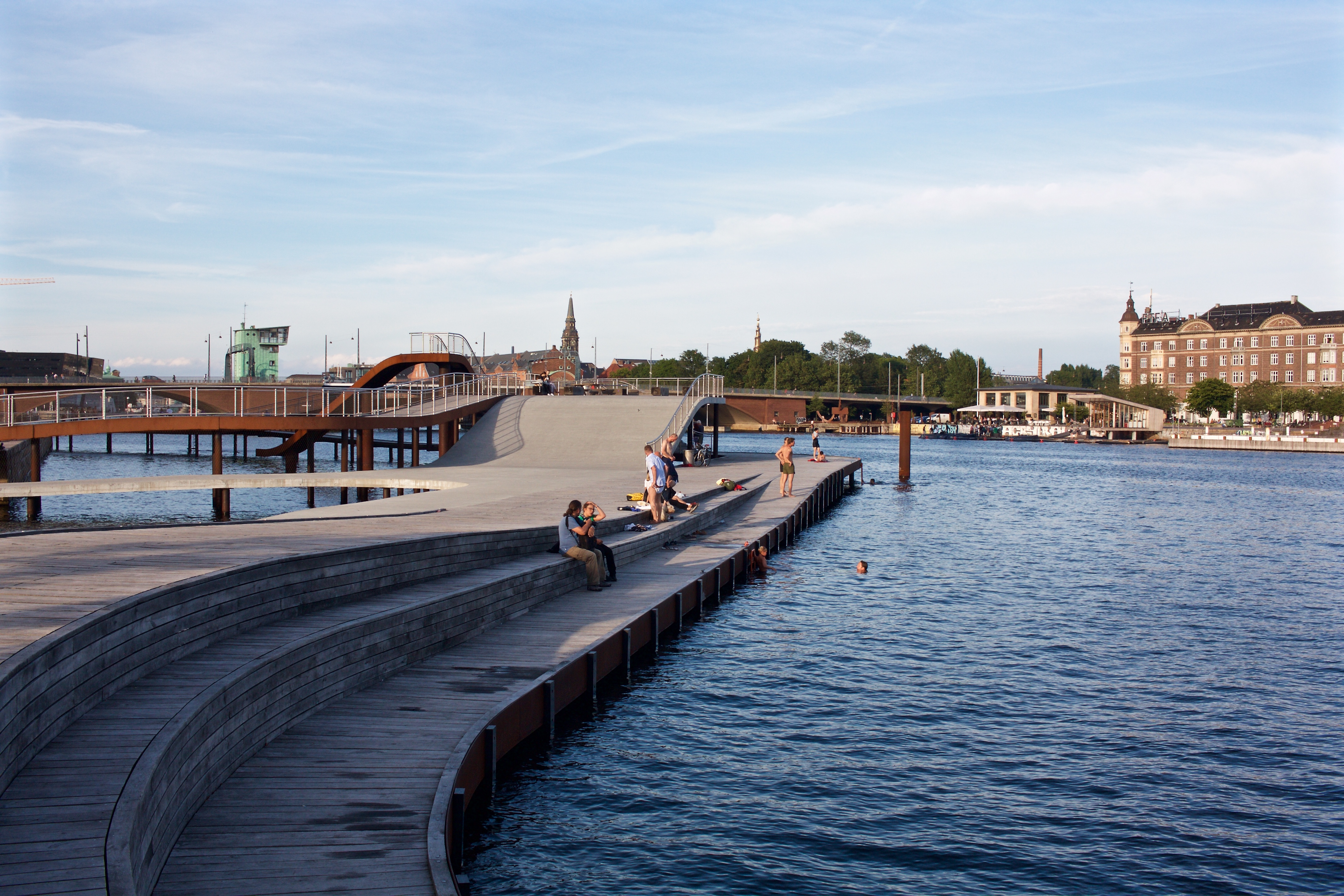 Kalvebod Bølge recreational walkway at Kalvebod Brygge in Copenhagen, Denmark